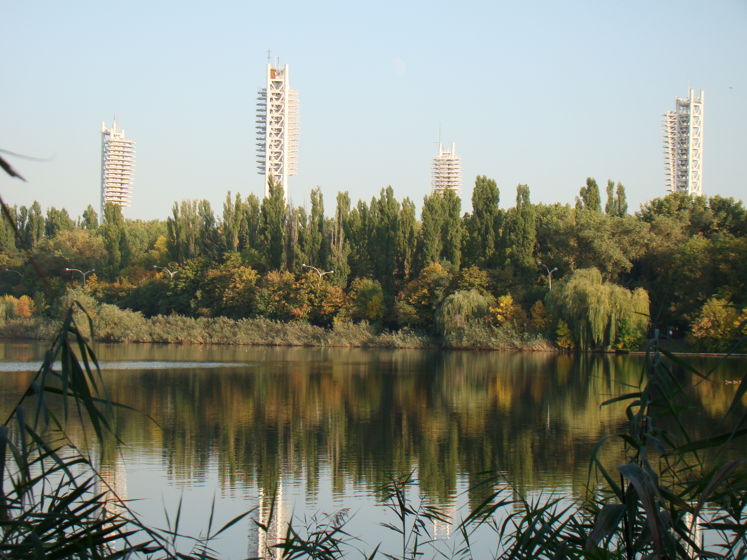 Краснодар. Вид на Верхний Покровский пруд (Карасун) с Дмитриевской дамбы. На противоположном берегу расположен парк стадиона Кубань.